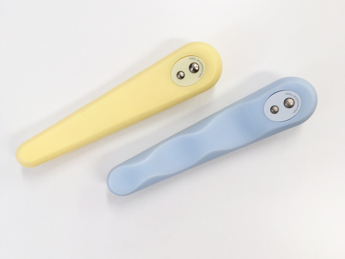 irohafit